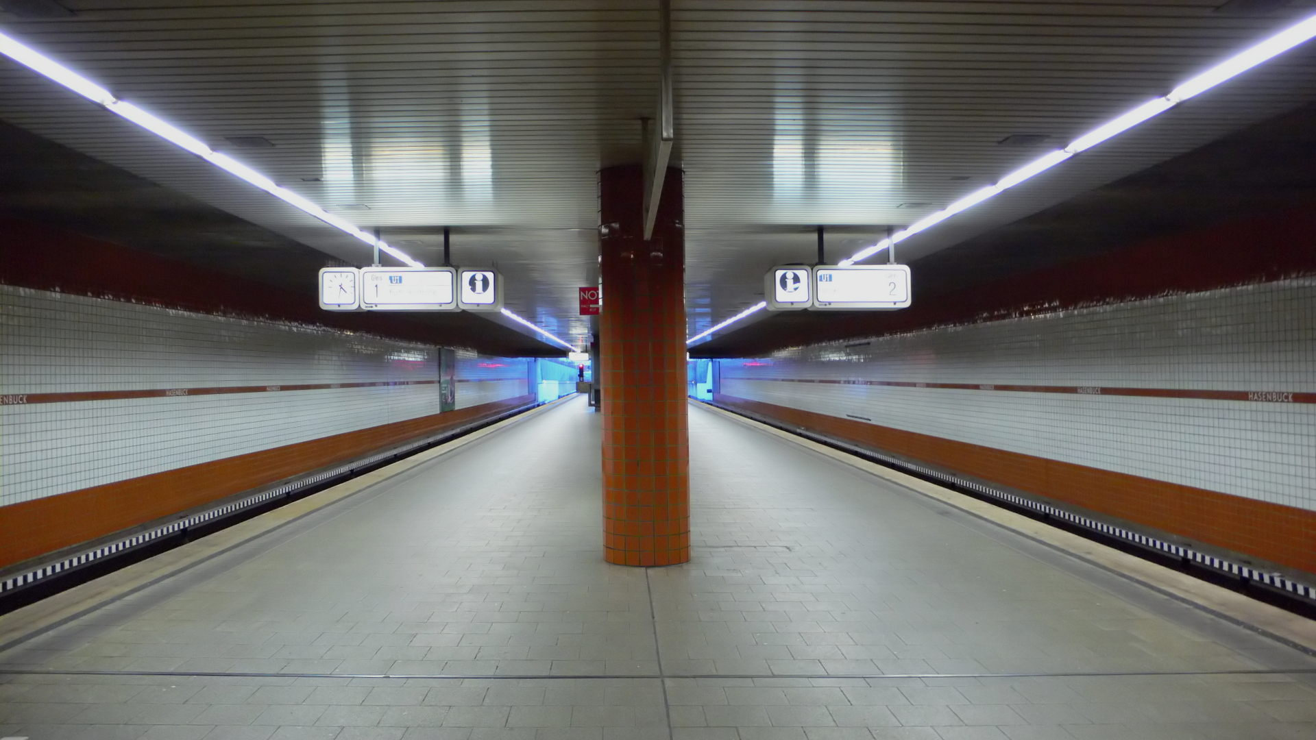 U-Bahnhof Hasenbuck der U-Bahn Nürnberg, Bahnsteigebene, Blick von Nordwesten